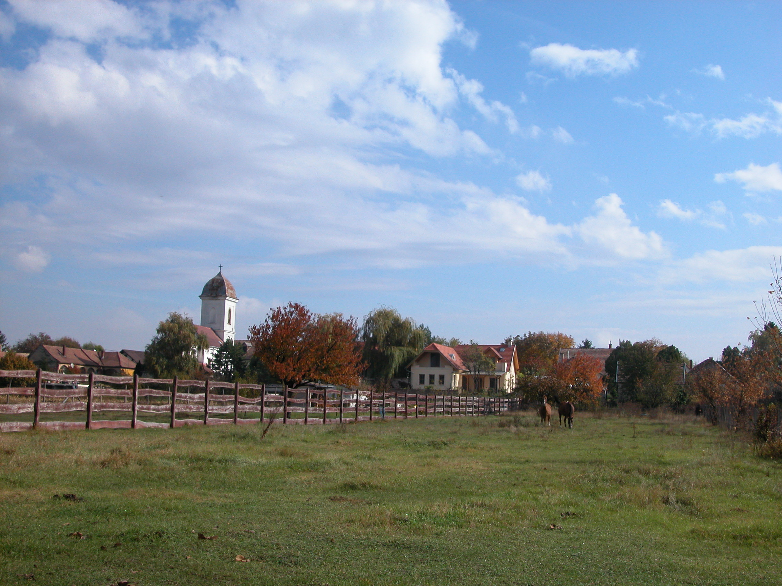 Szigetmonostor, Hungary